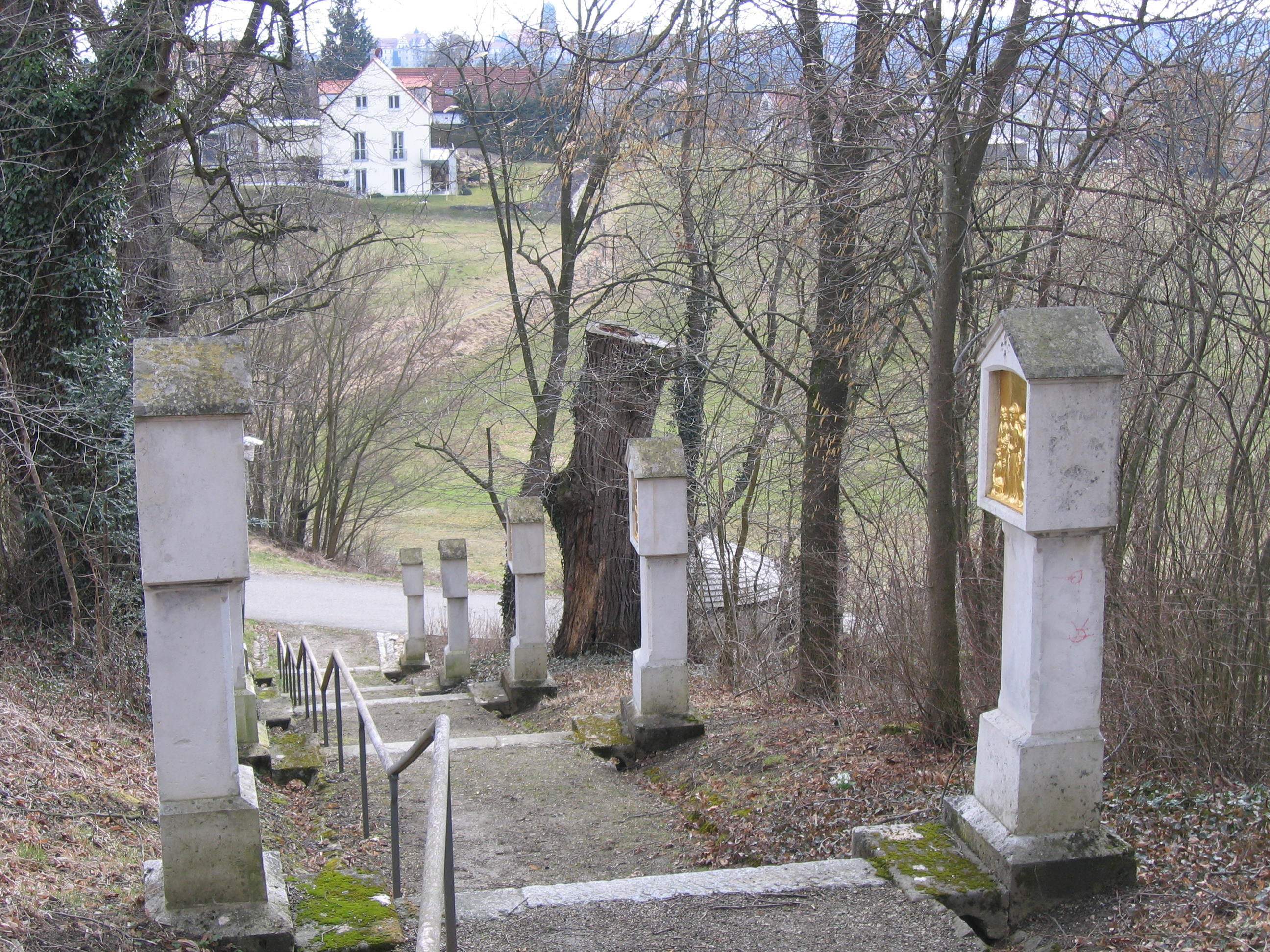 Kreuzwegstationen säumen den Rieder Kirchenweg.